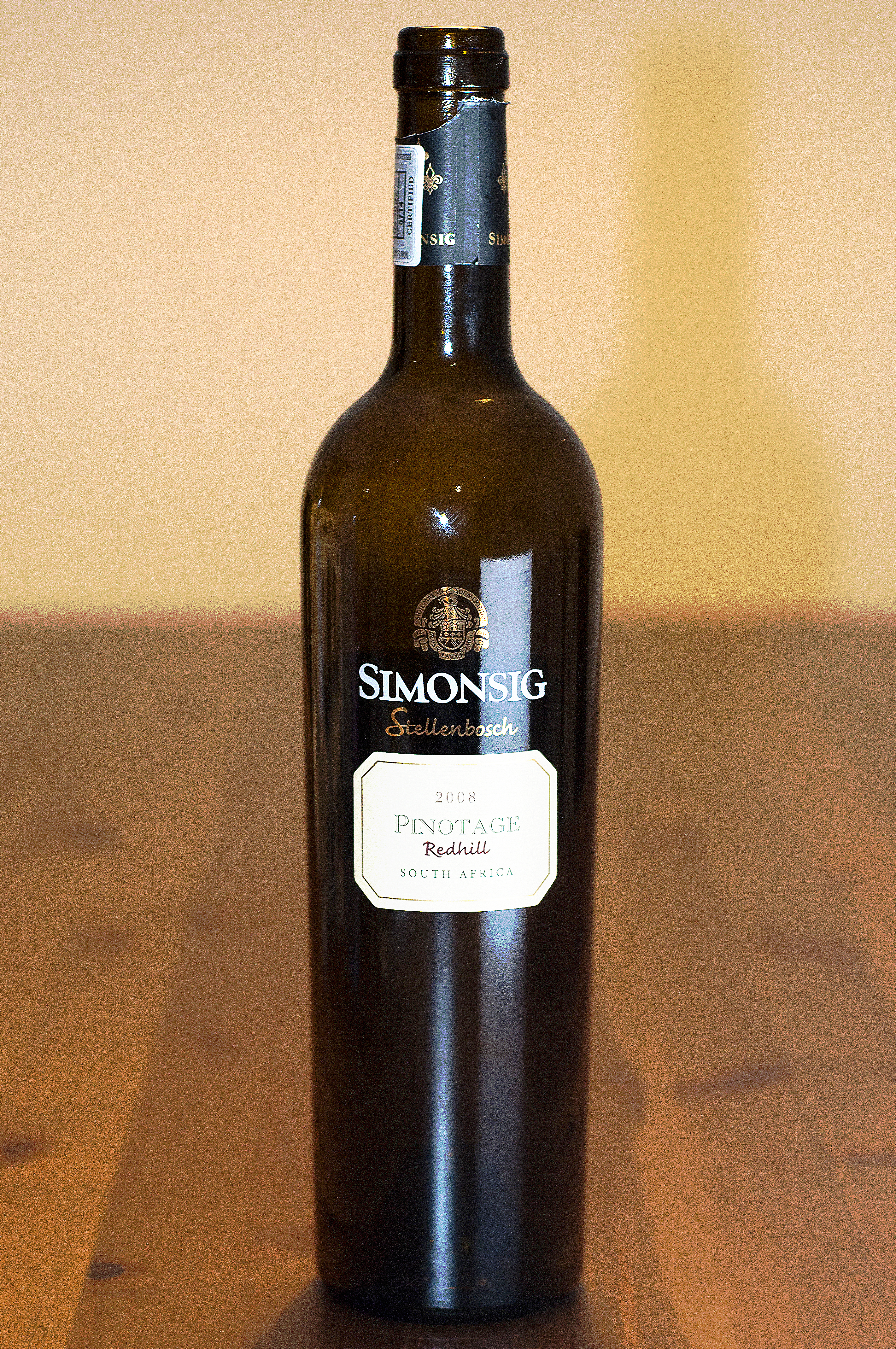 Pinotage Redhill 2008